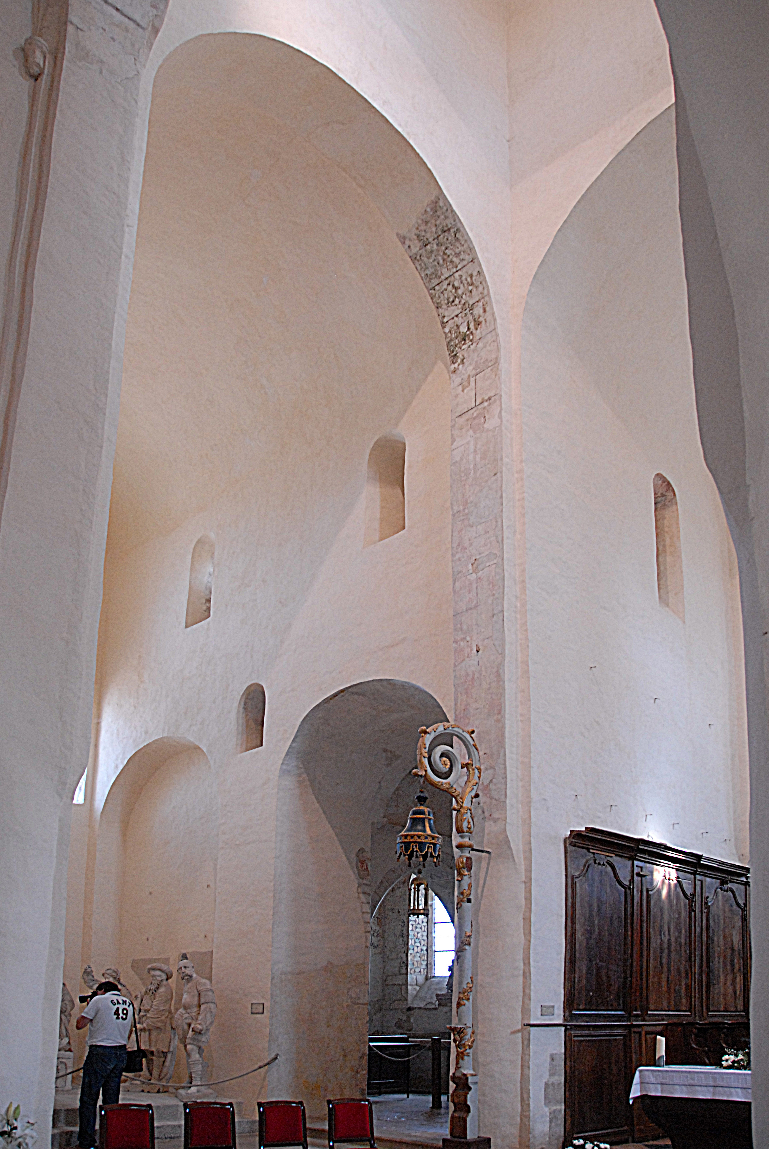 St-Vorles de Châtillon-s-S, nordwestl. Querhausarm